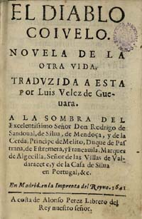 page de titre